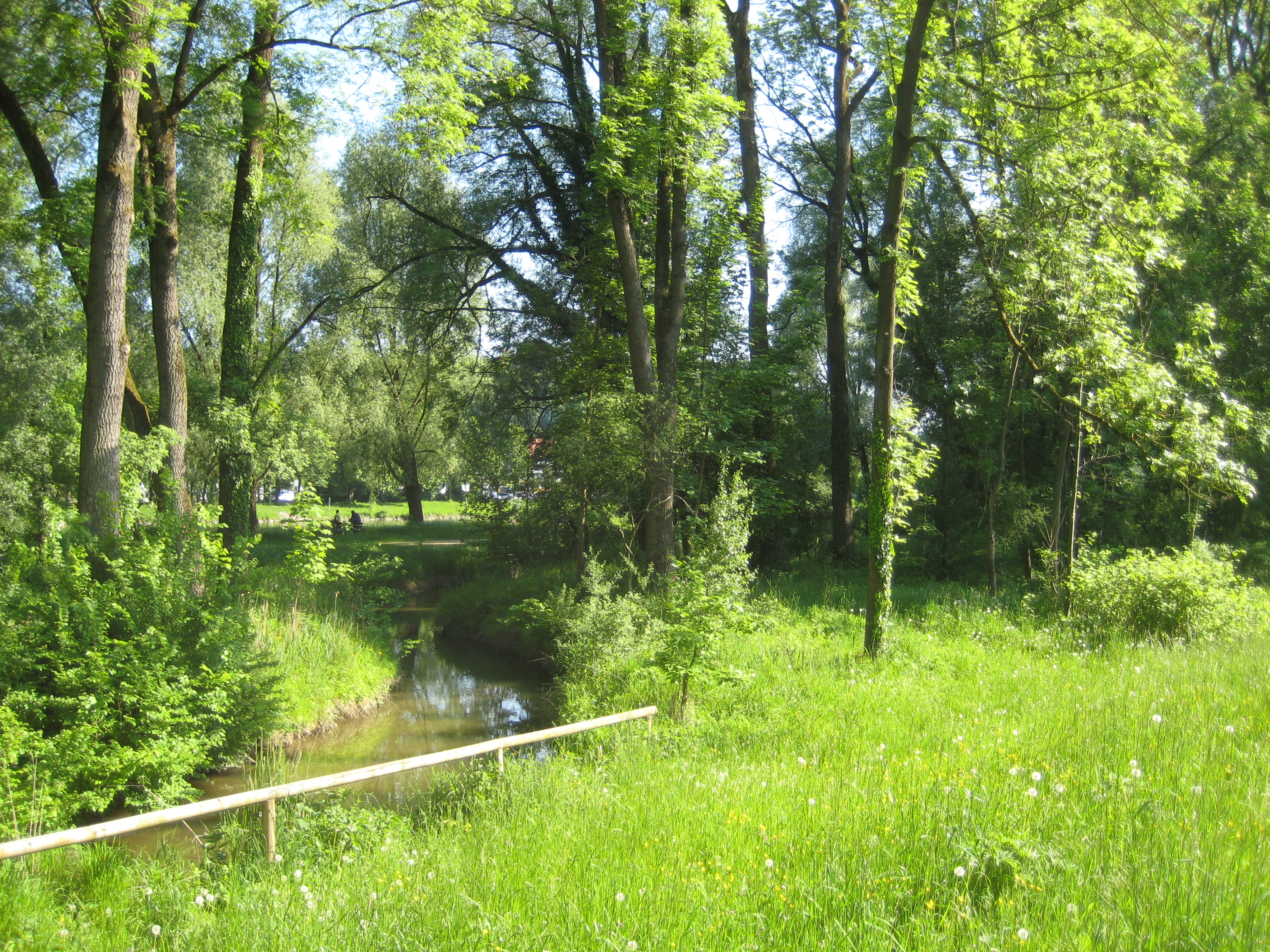 Bachlauf neben Isar